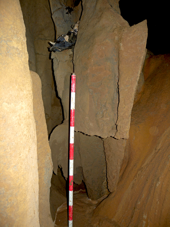 Paleontologia. Ursus deningeri burhezur bat Goikoetxe koban (Busturia, Bizkaia).